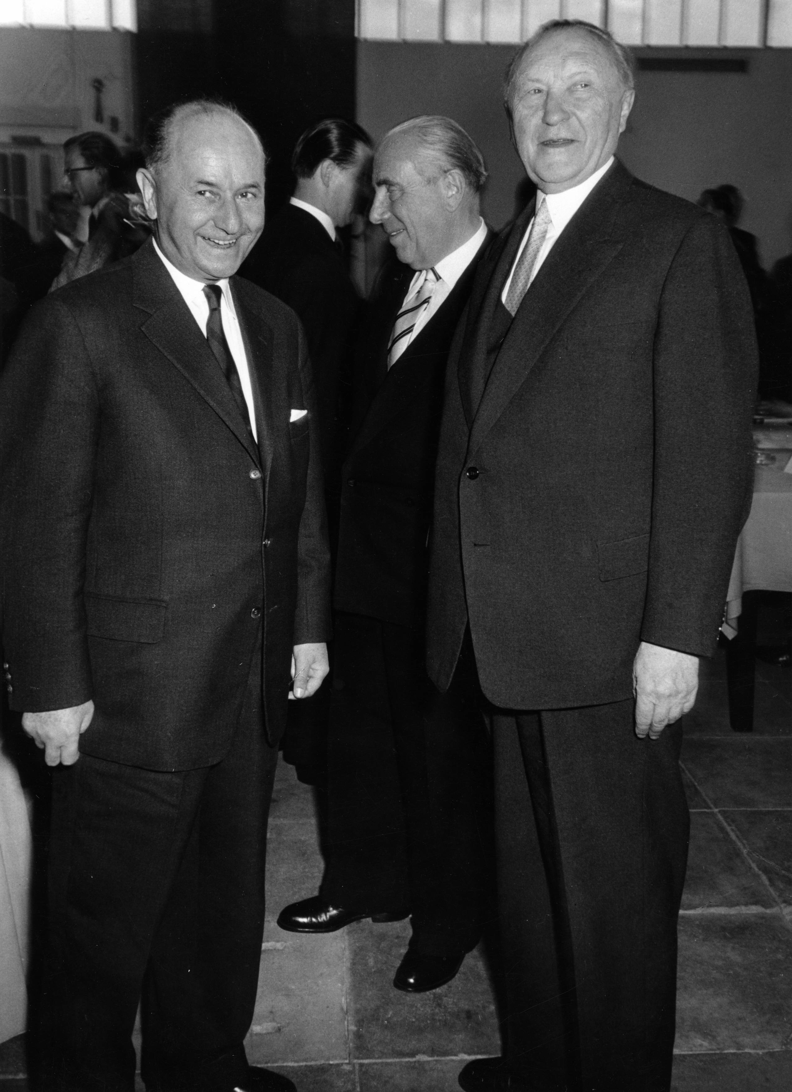 Adenauer, Konrad7. CDU-Bundesparteitag, 12.05.1957 - 15.05.1957